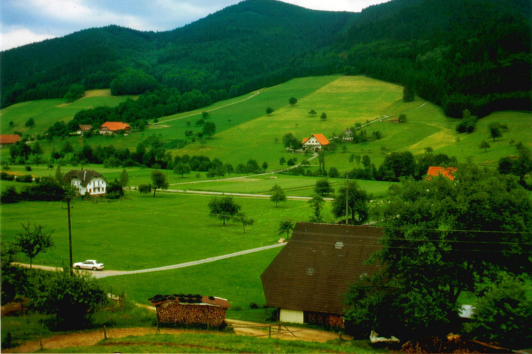 Oberwolfach_Mitteltal_1999